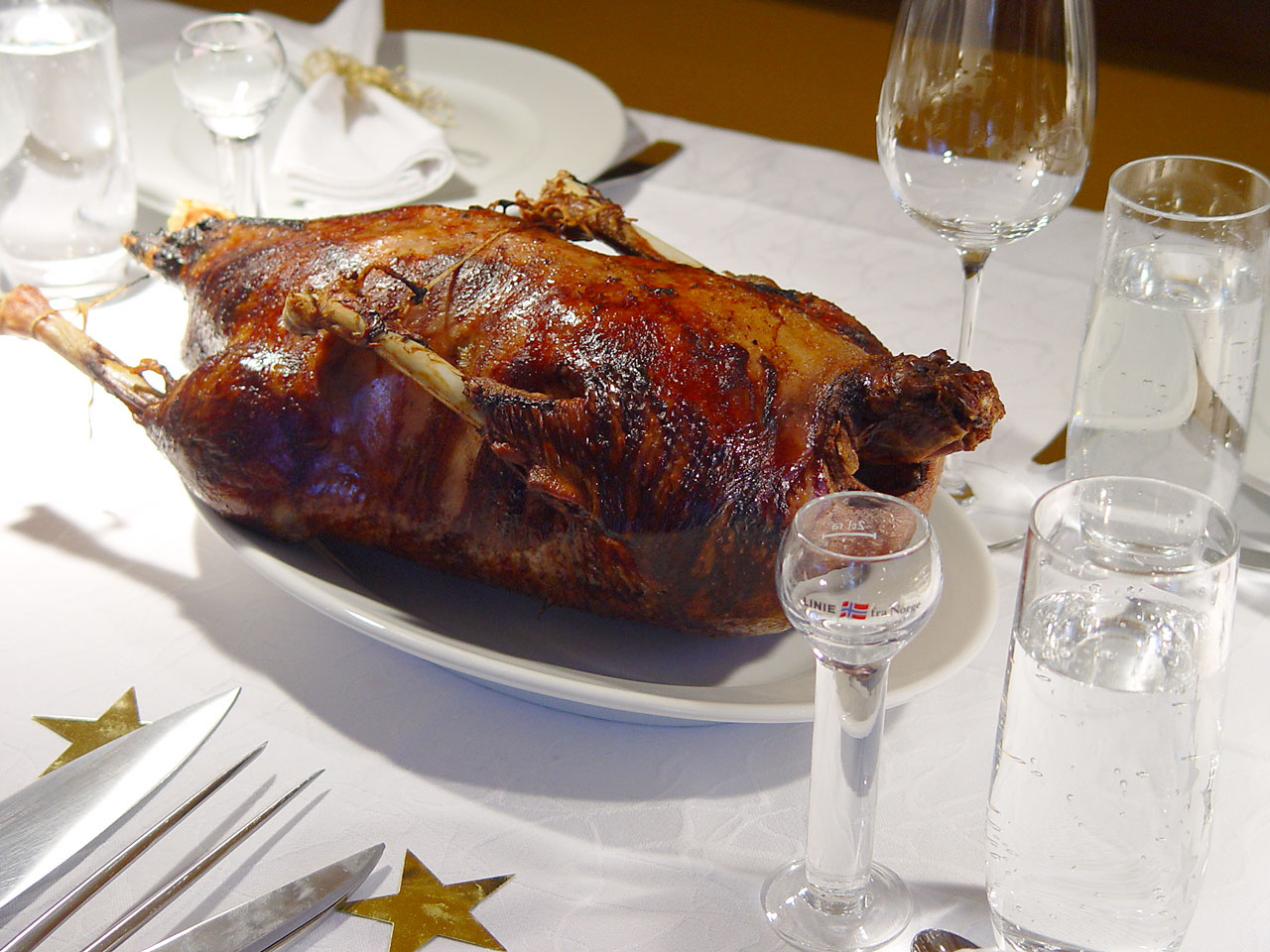 Christmas goose (Weihnachtsgans)